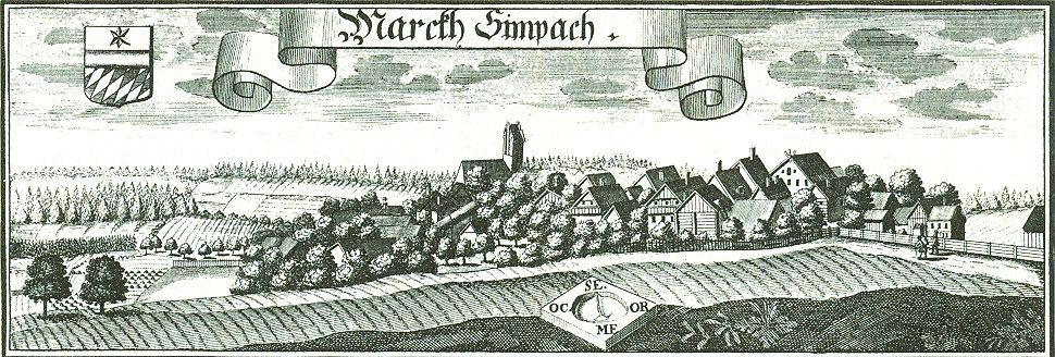 Simbach bei Landau nach einem Stich von Michael Wening von 1721